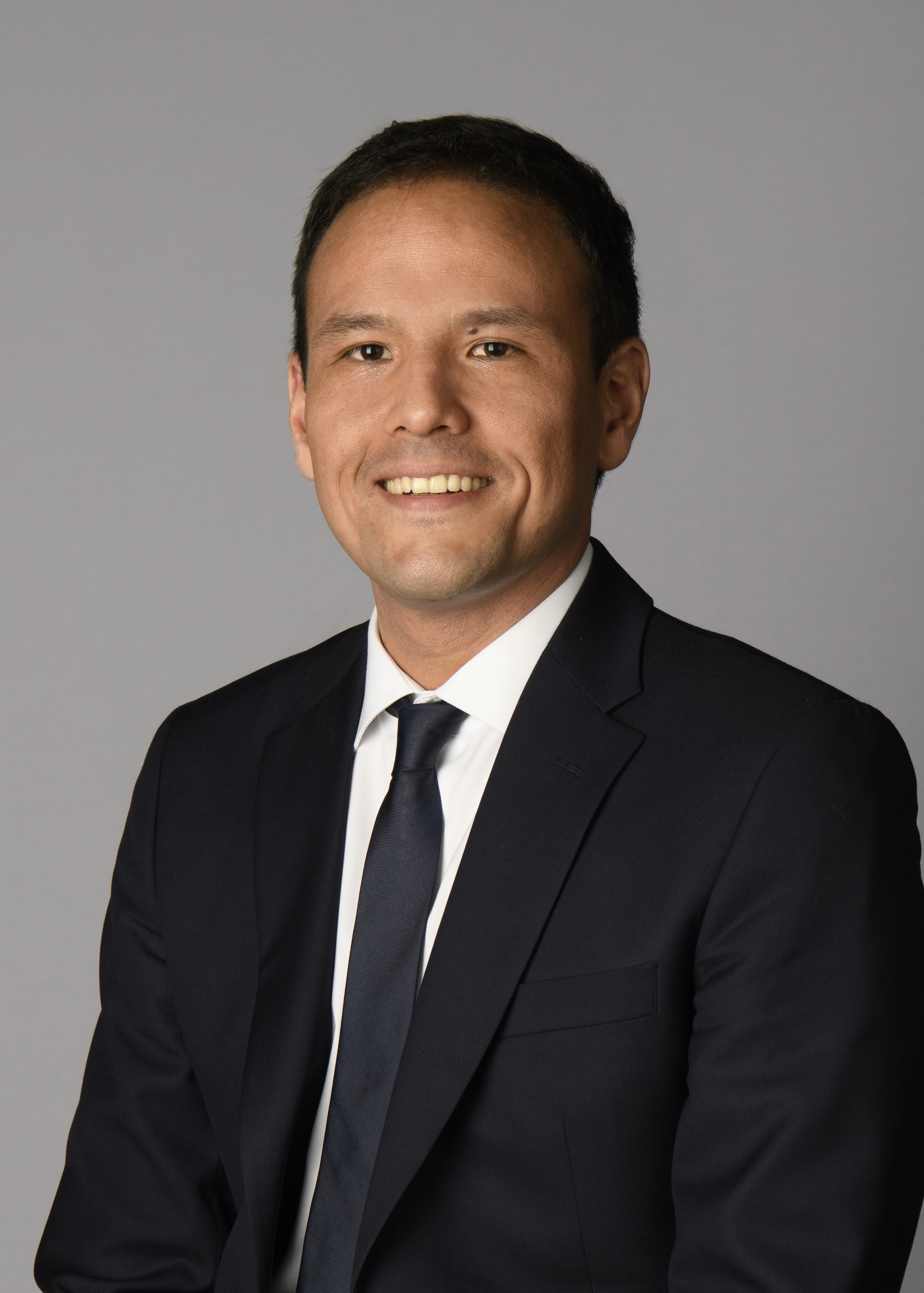 Photo de Cédric O